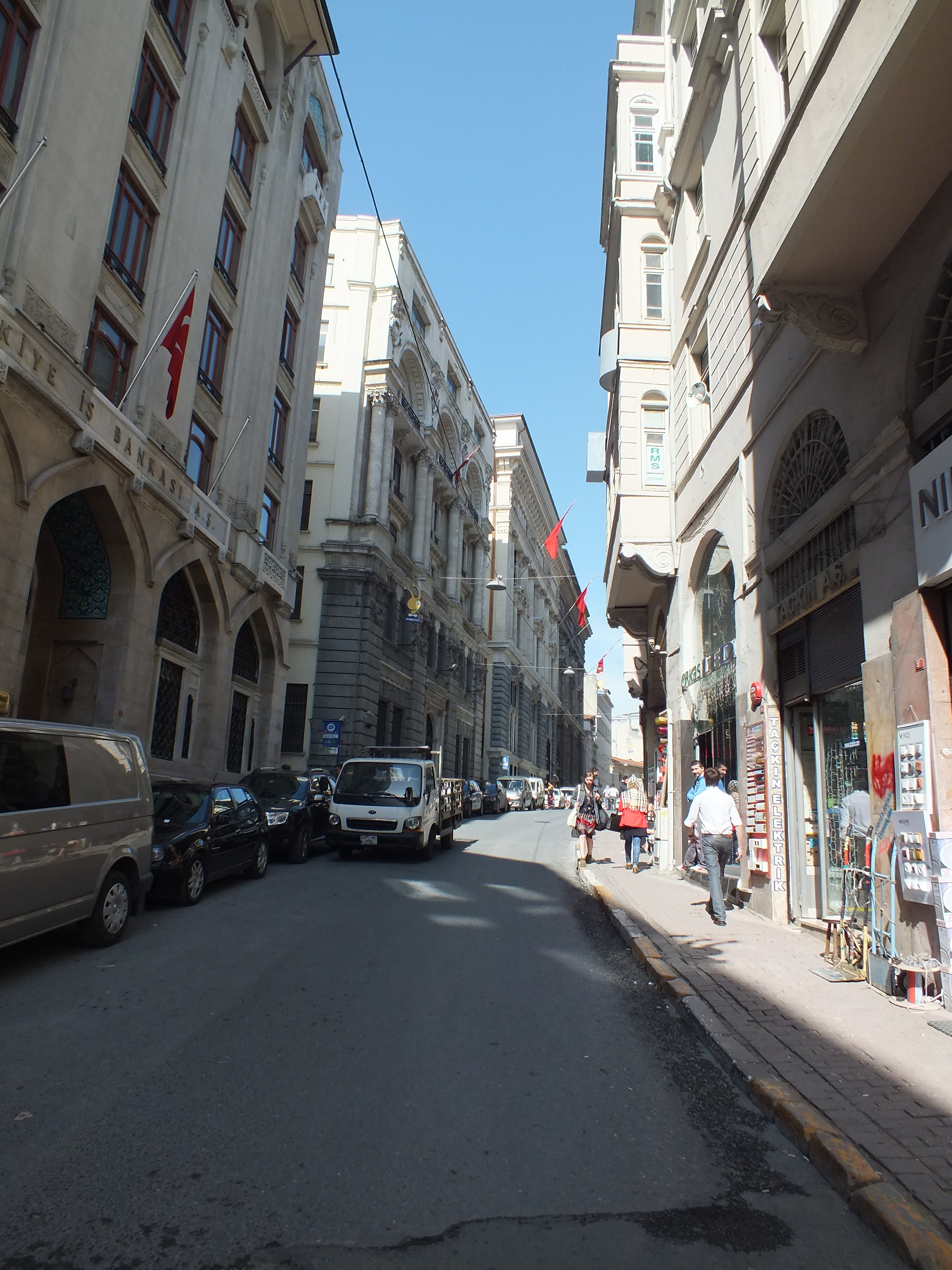 Bankalar Caddesi